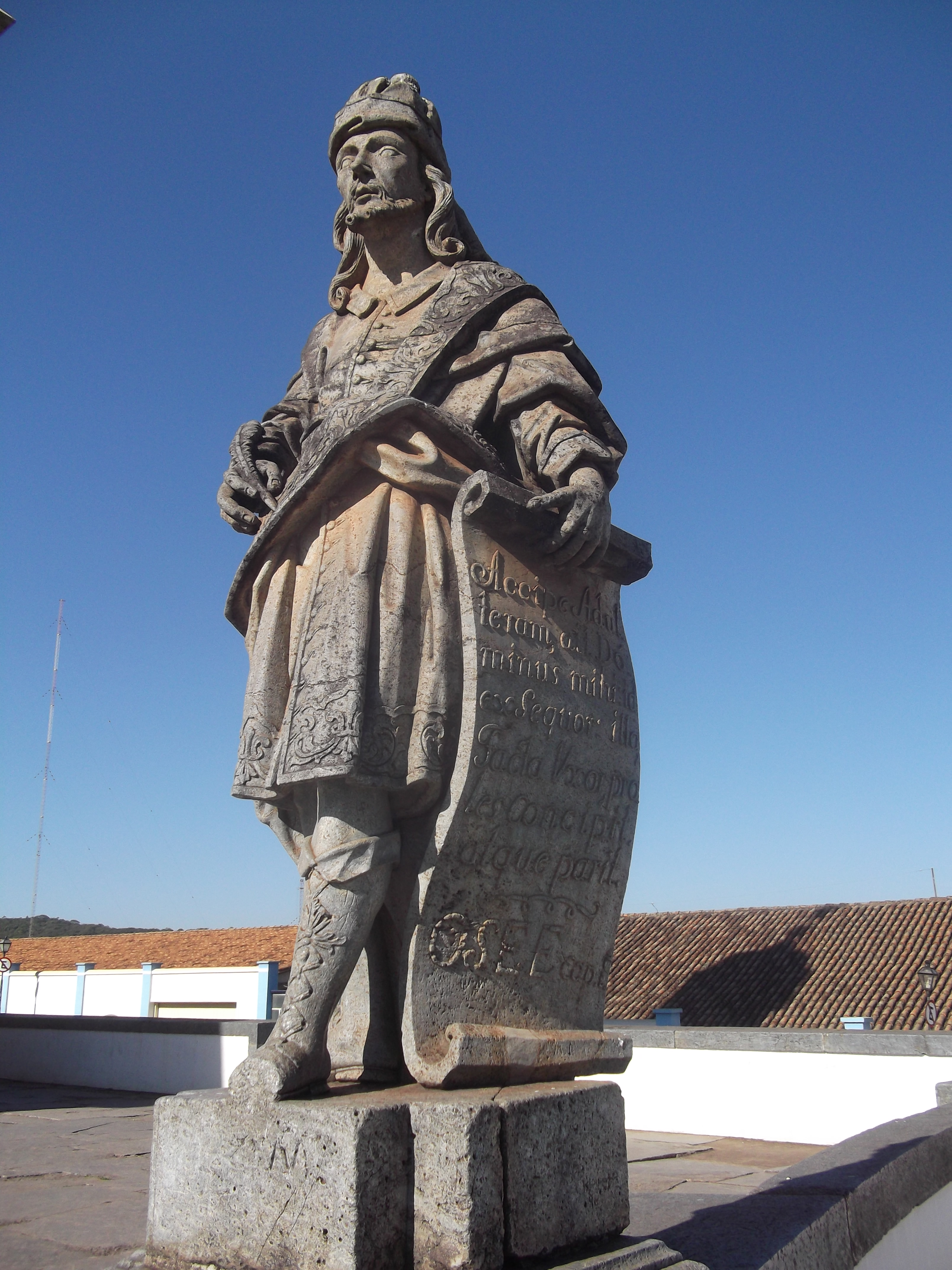 Statues in Santuário do Bom Jesus de Matosinhos - escultor: Aleijadinho